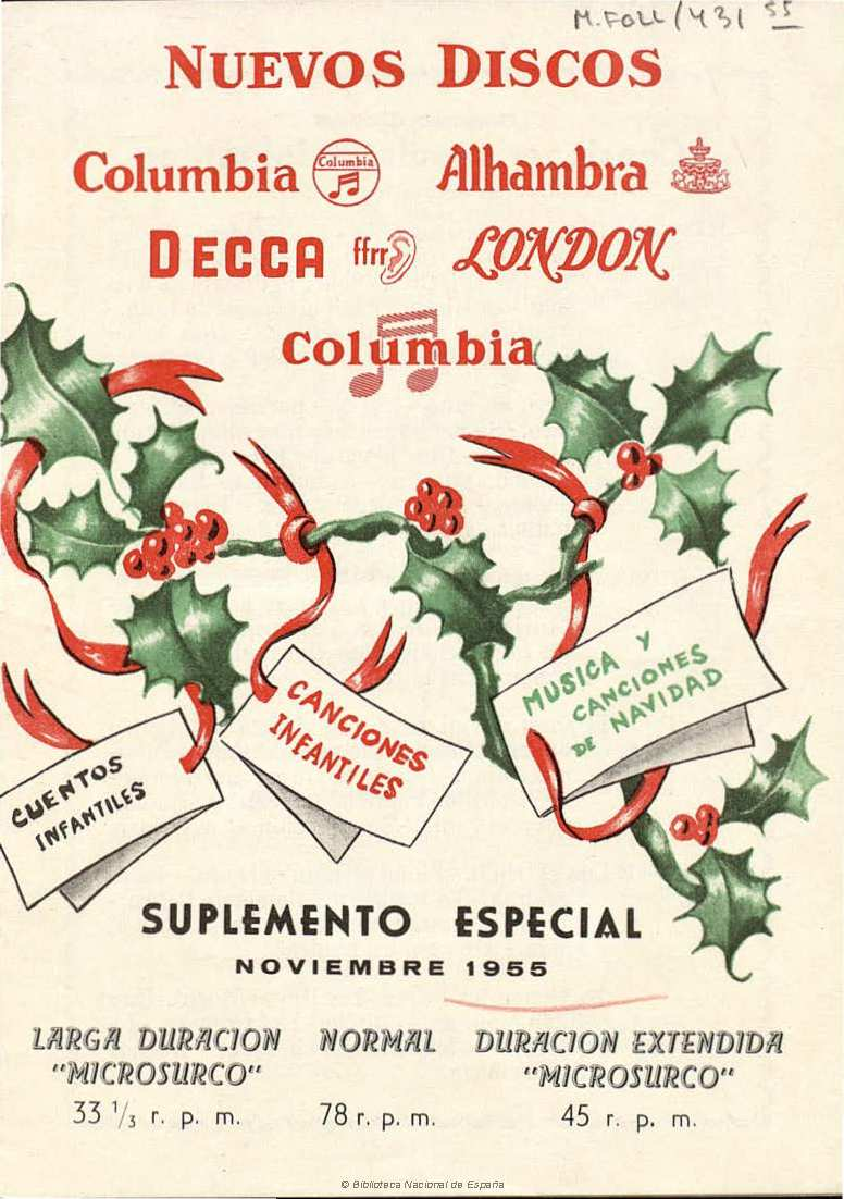 Nuevos discos Columbia, Alhambra, Decca, London. Suplemento especial, Larga duración microsurco 33 1/3 r.p.m., Normal 78 r.p.m., Duración extendida microsurco 45 r.p.m. : noviembre 1955 Autor: Columbia Records, Inc. (Casa discográfica) Fecha: 1955 Datos de edición: San Sebastián, Fábrica de discos Columbia